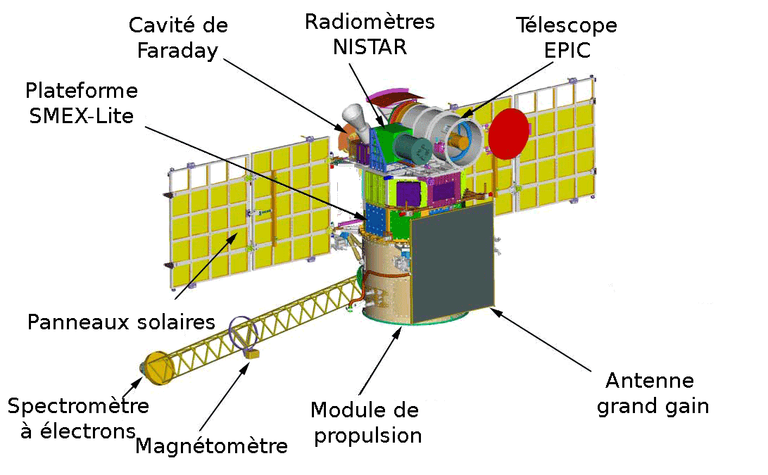 Schéma du satellite Deep Space Climate Observatory (légende en français)